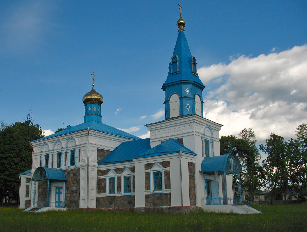 Беларуская (тарашкевіца): Докшыцы